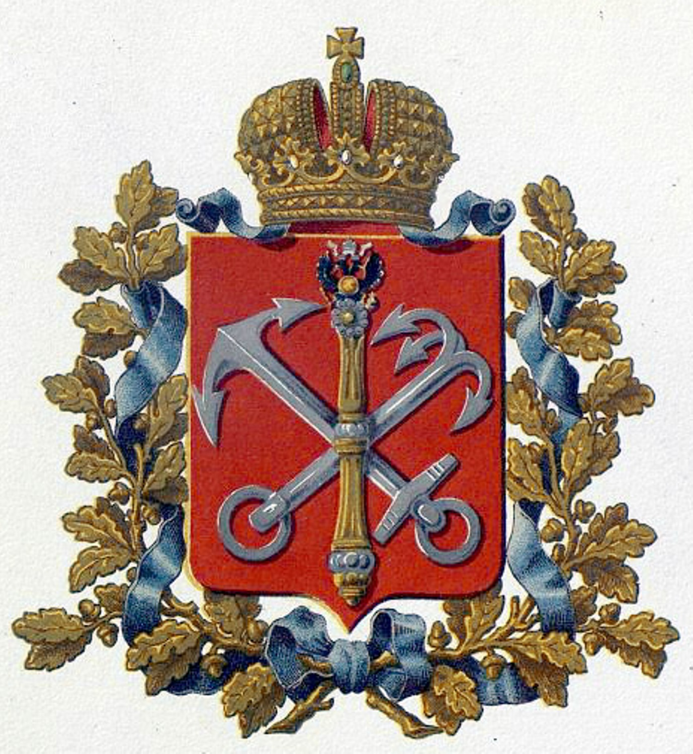 Official Russian Empire coat of arms Saint-Petersburg Governorate. Герб Российской Империи Санктпетербургской губернии в Гербовнике МВД. Утверждён Императором Всероссийским Александром Вторым.